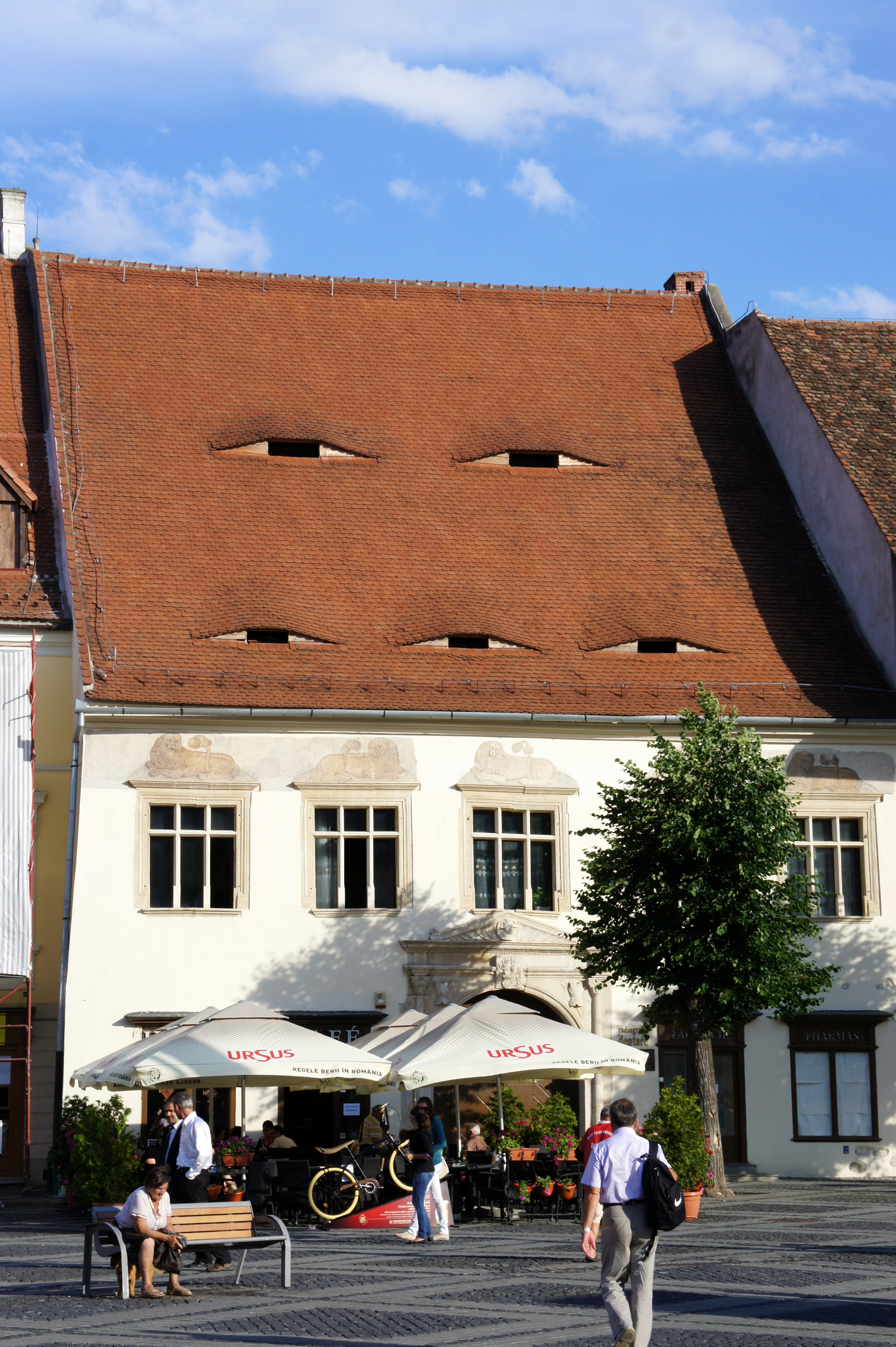 Casa Haller